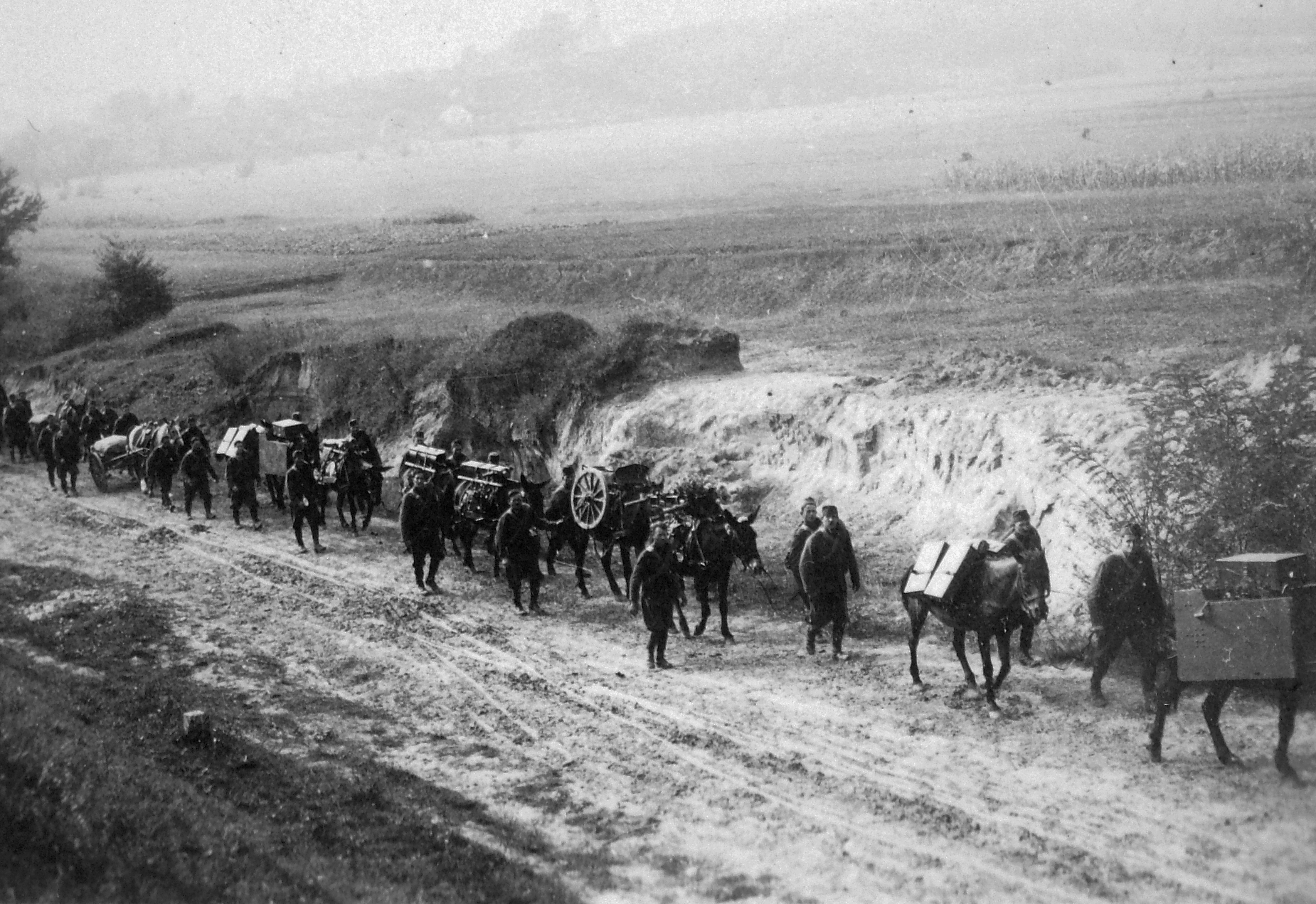 Eastern front Ukraine? Russia? 15/31M 75 mm-es Skoda hegyiágyú kezelőivel menetben. Tags: mule, horse, second World War, soldier, cannon, Skoda-brand, carrying loads Title: 15/31M 75 mm-es Skoda hegyiágyú kezelőivel menetben.